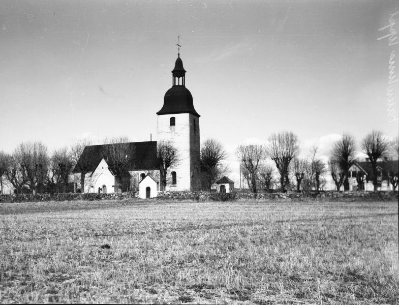 Kyrkan och dess omgivning mot sydöst.